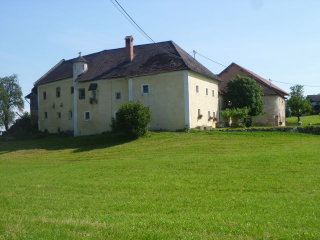 Schloss_Breitenbruck_heute